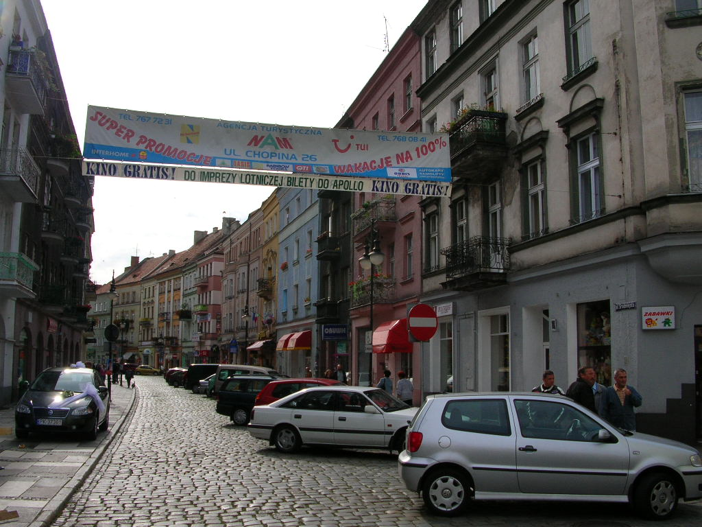 ul.Śródmiejska - Kalisz. Autor : Bartek Wawraszko (Bast)